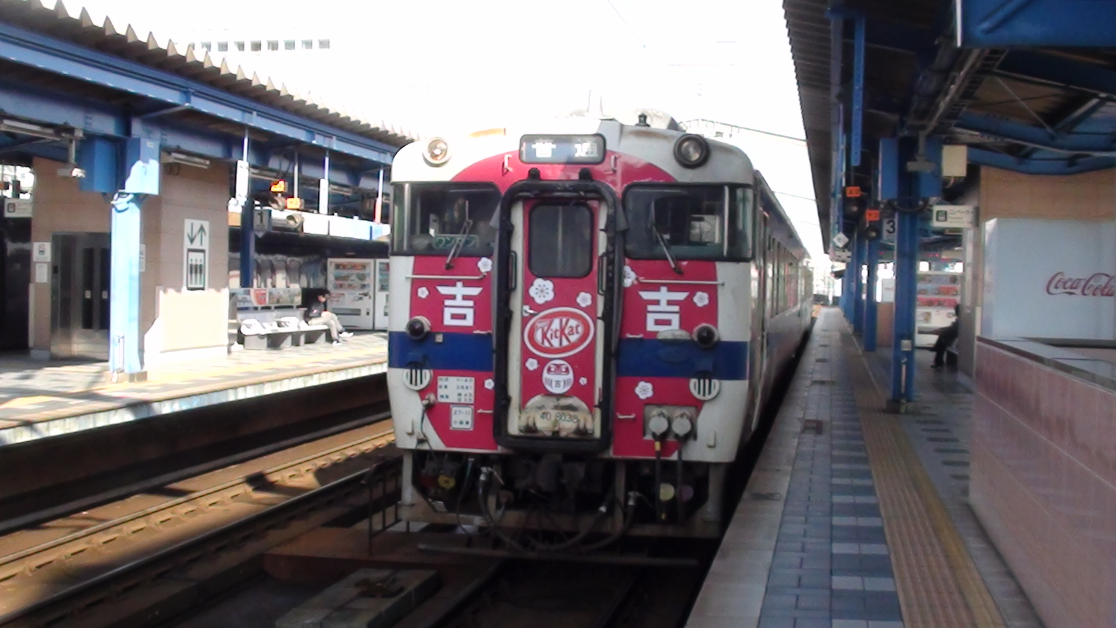 吉都線・キットカットラッピング車両/宮崎駅にて/2018年12月27日、10:03:20